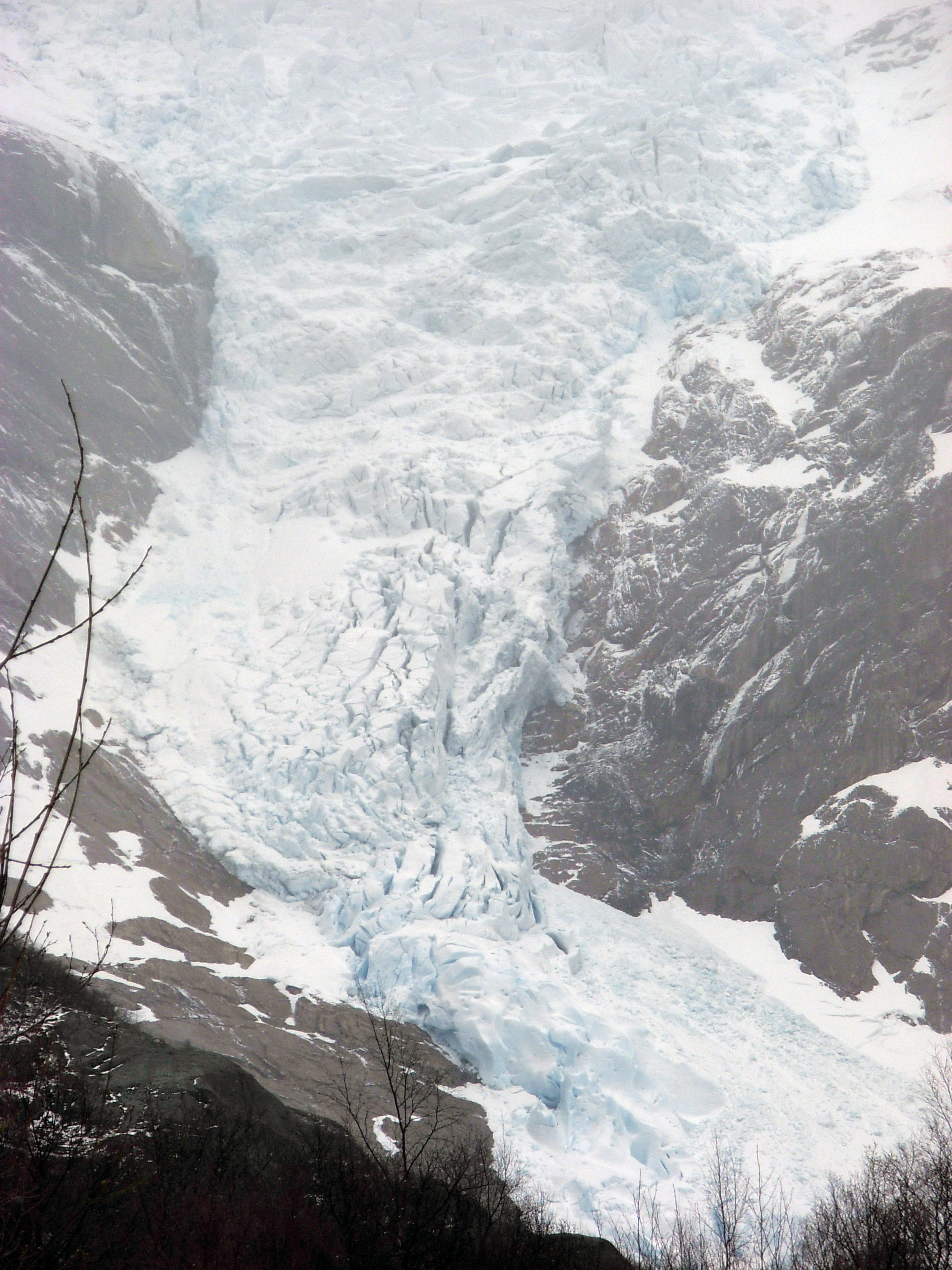 Jostedalsbreen ledynas/Jostedalsbreen glacier